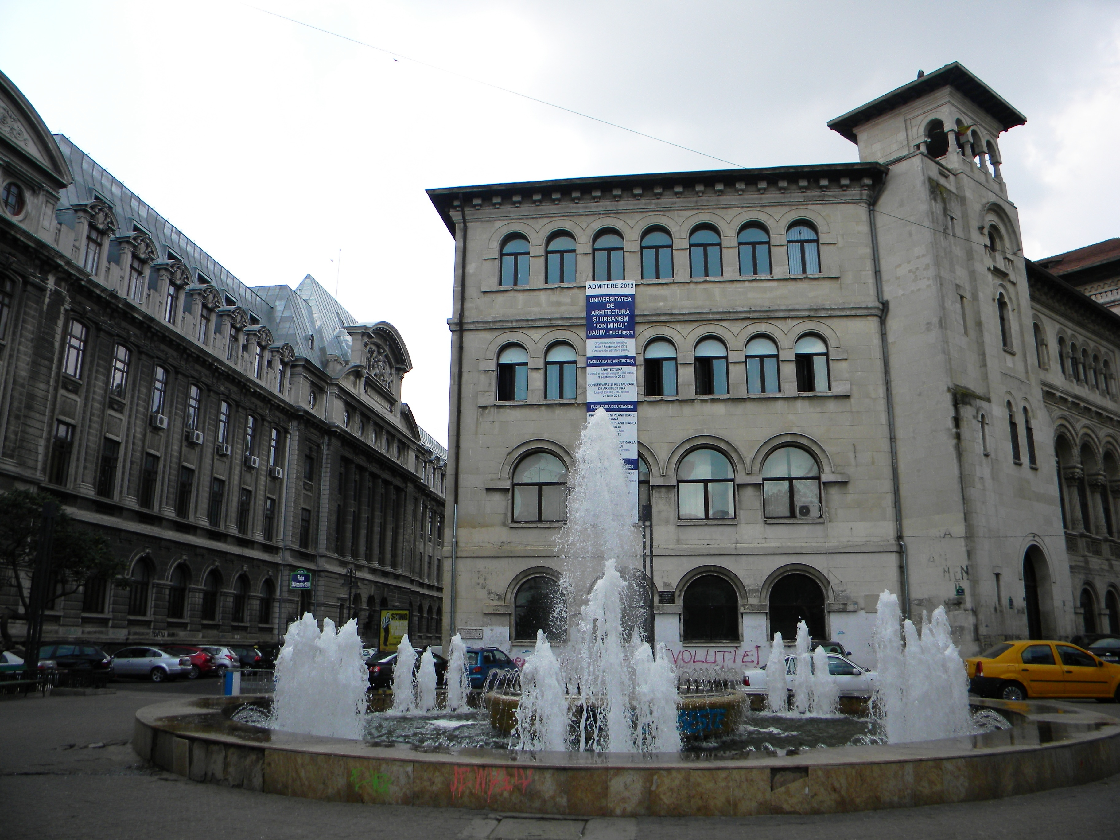 Facultatea de Arhitectura si Urbaniasm, "Ion Mincu" si Fantana arteziana, Bucuresti